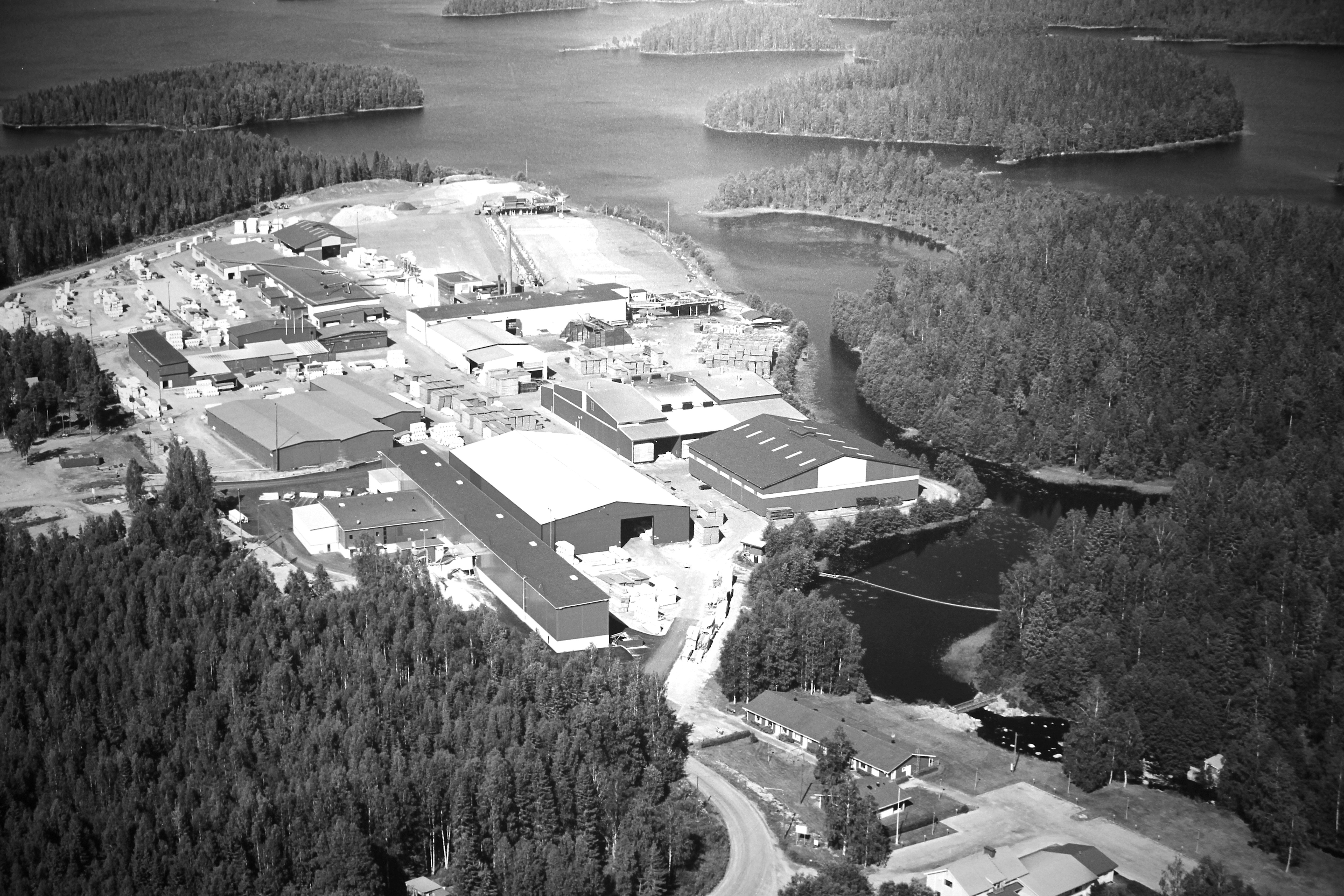 AURESKOSKEN JALOSTETEHDAS Tuotantolaitoksessa on 120 000 m3 kapasiteetti paneelien ja lattialautojen ja muiden jalosteiden valmistukseen sekä pintakäsittelylaitos.